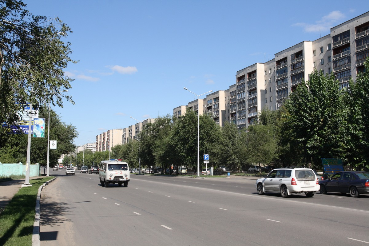 Semey